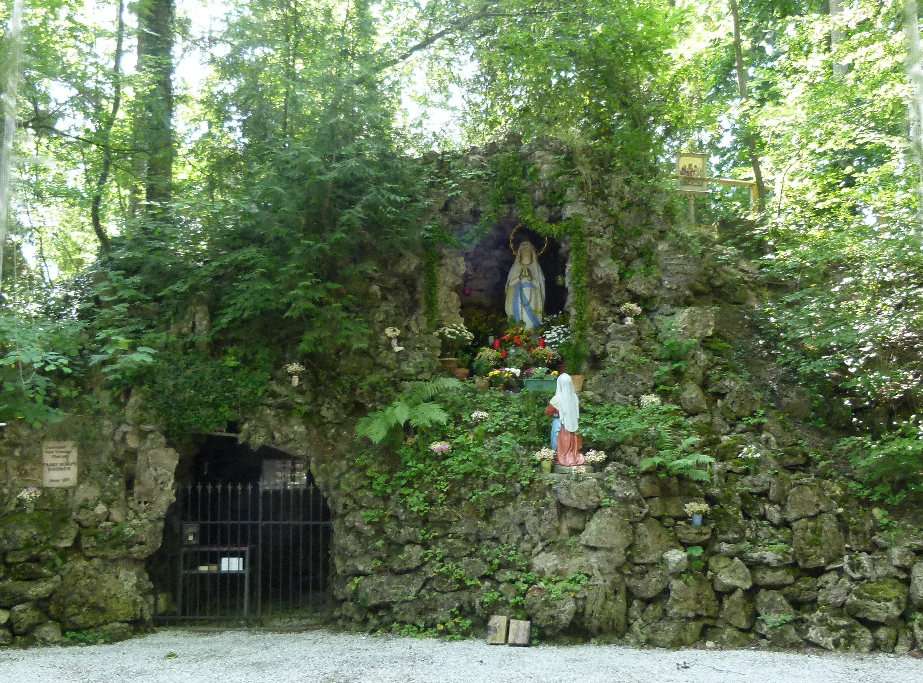 Burgstall mit Kalvarienberg und Lourdesgrotte in Emmenhausen (Waal)